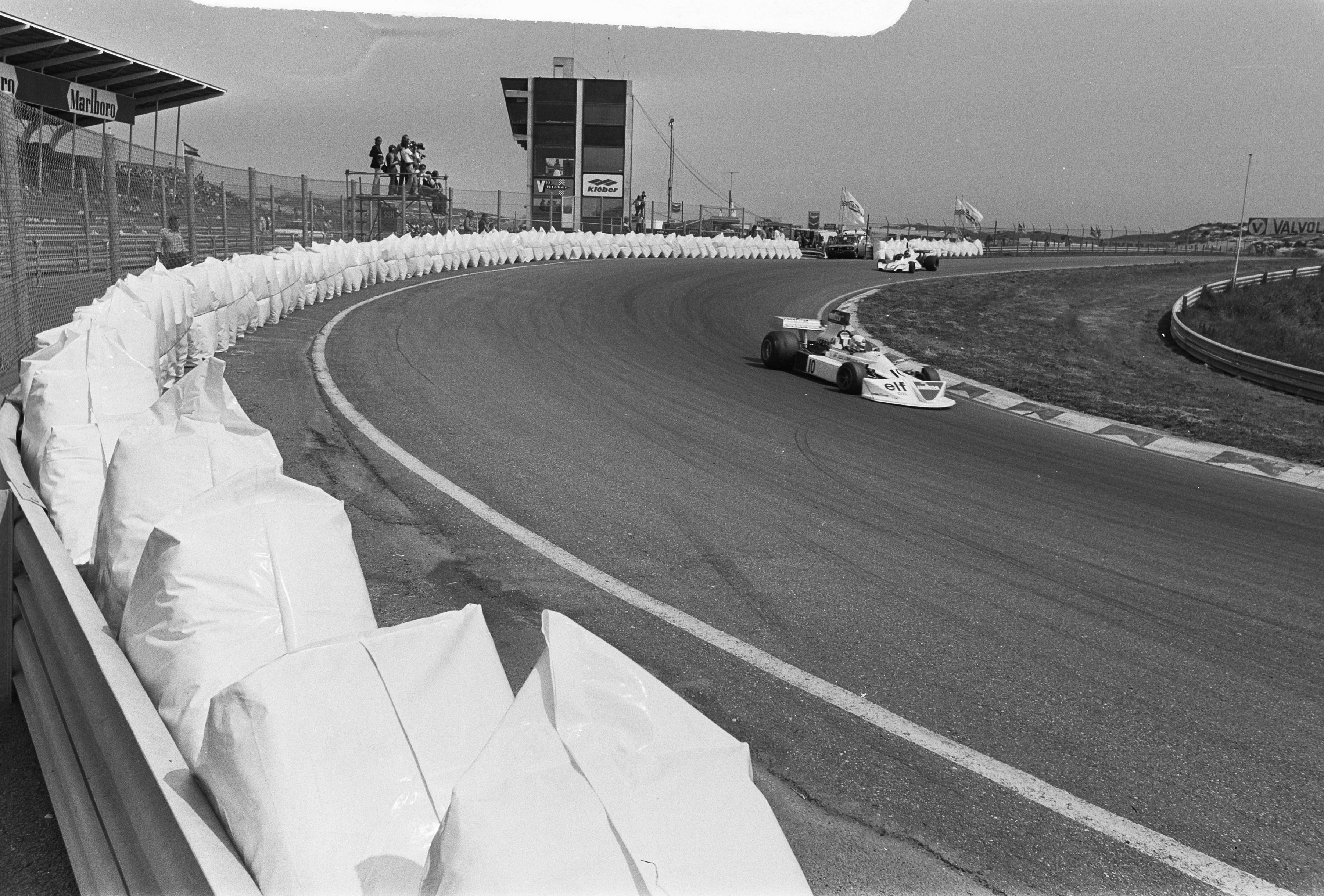 Training voor de Grand Prix op het circuit van Zandvoort.